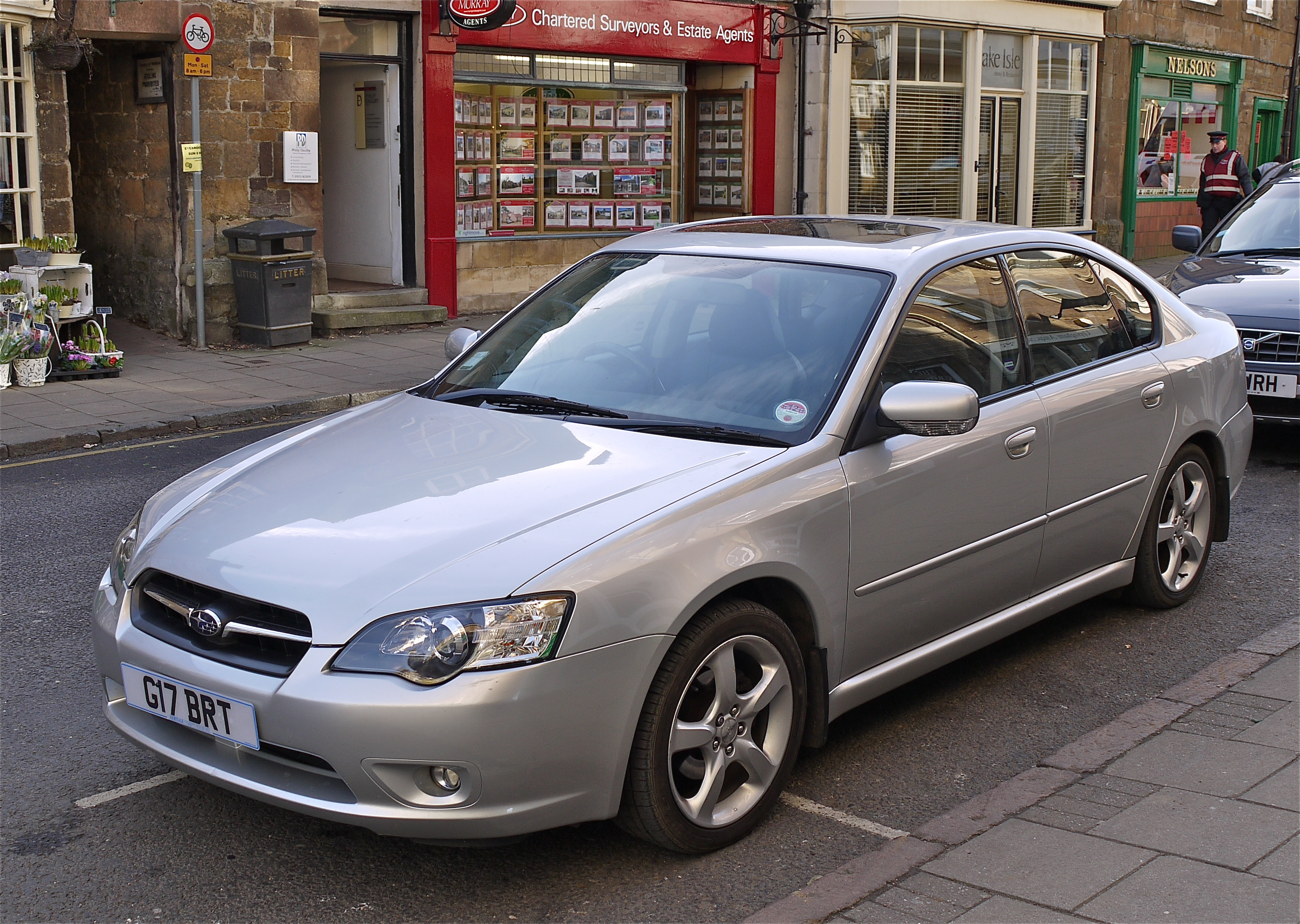 Panasonic G1 14-45 Lens